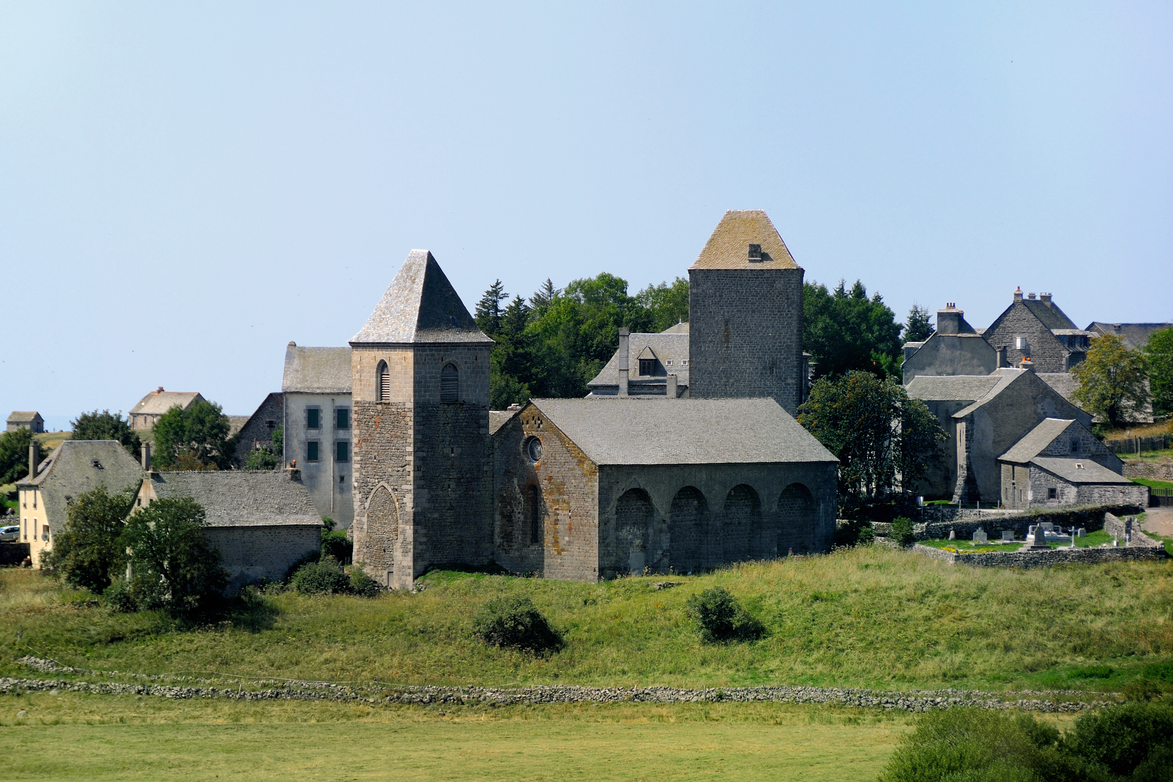 Vue du village d'Aubrac et des vestiges de la dômerie, commune de Saint-Chély d'Aubrac (Aveyron)